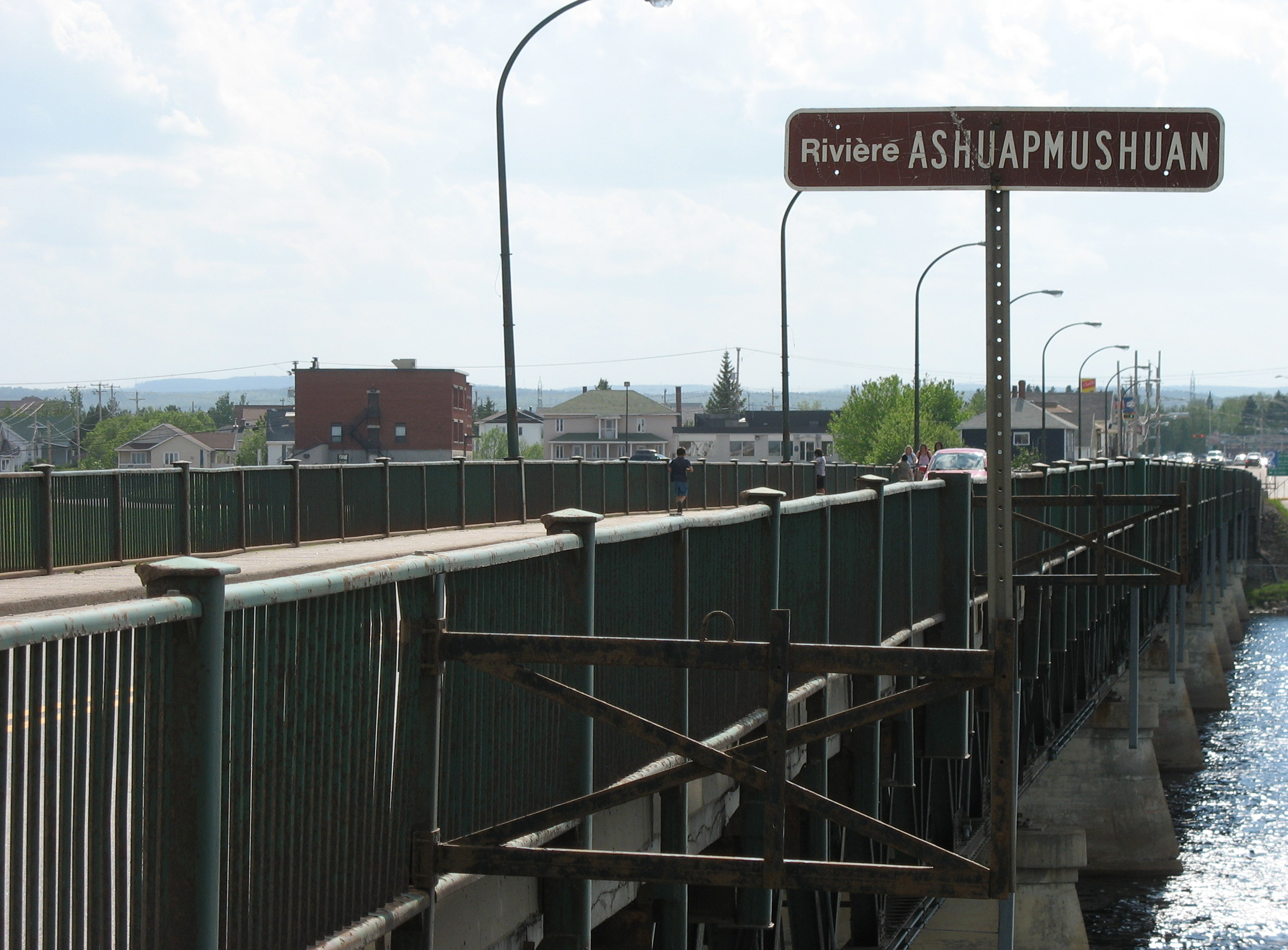 Le pont Carbonneau enjambe la rivière Ashuapmushuan à la hauteur de Saint-Félicien (Québec, Canada)